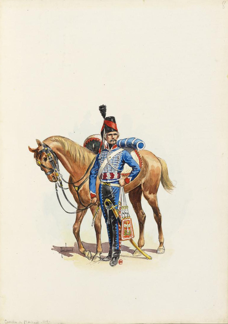 Cavalier du 1er Hussard en 1801